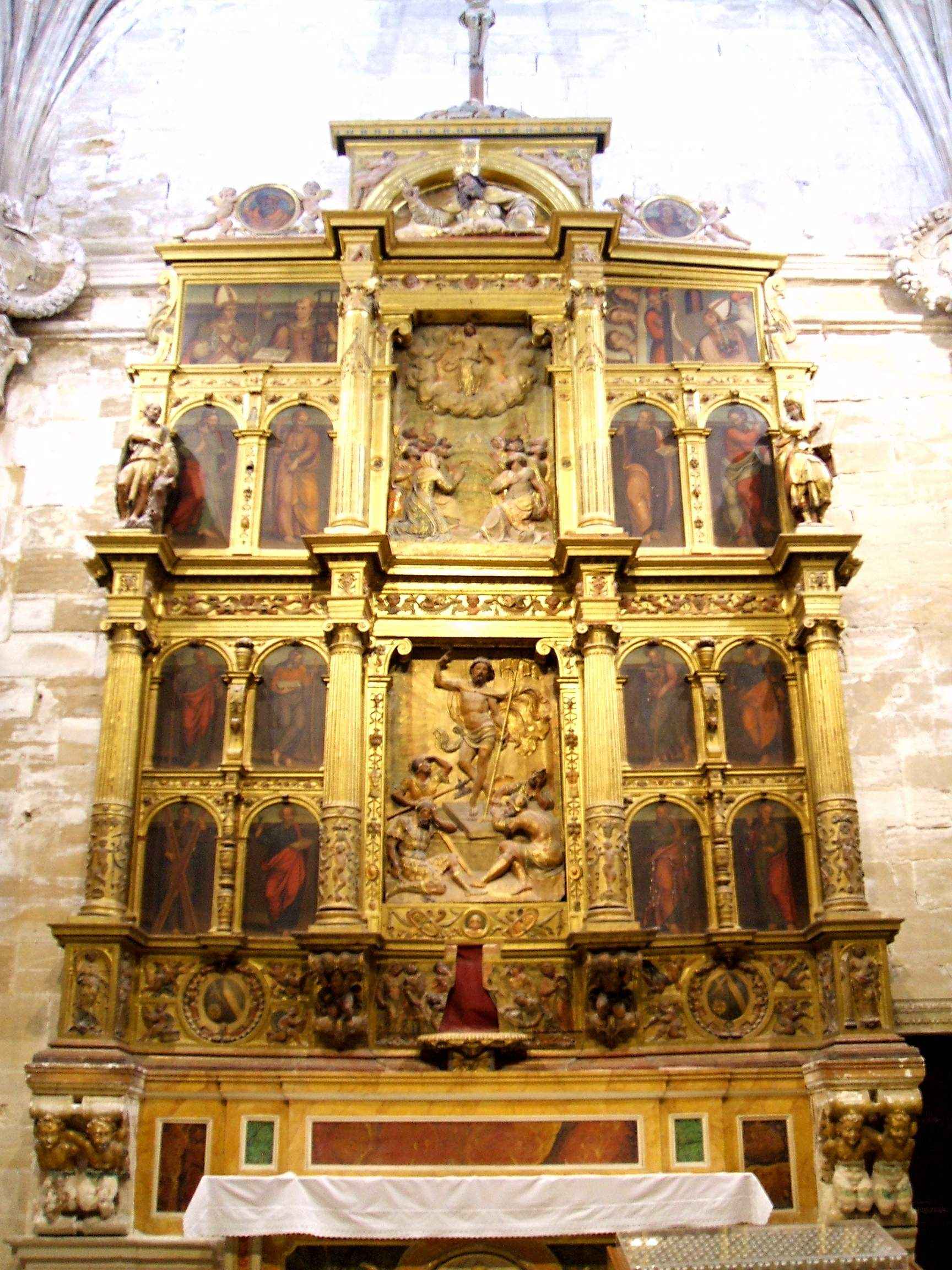 Catedral de Cuenca (España). Retablo renacentista de la Capilla de los Apóstoles